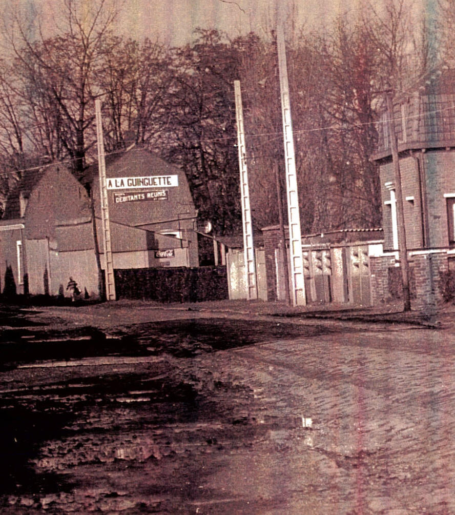 rue Voltaire avec la Guinguette au fond